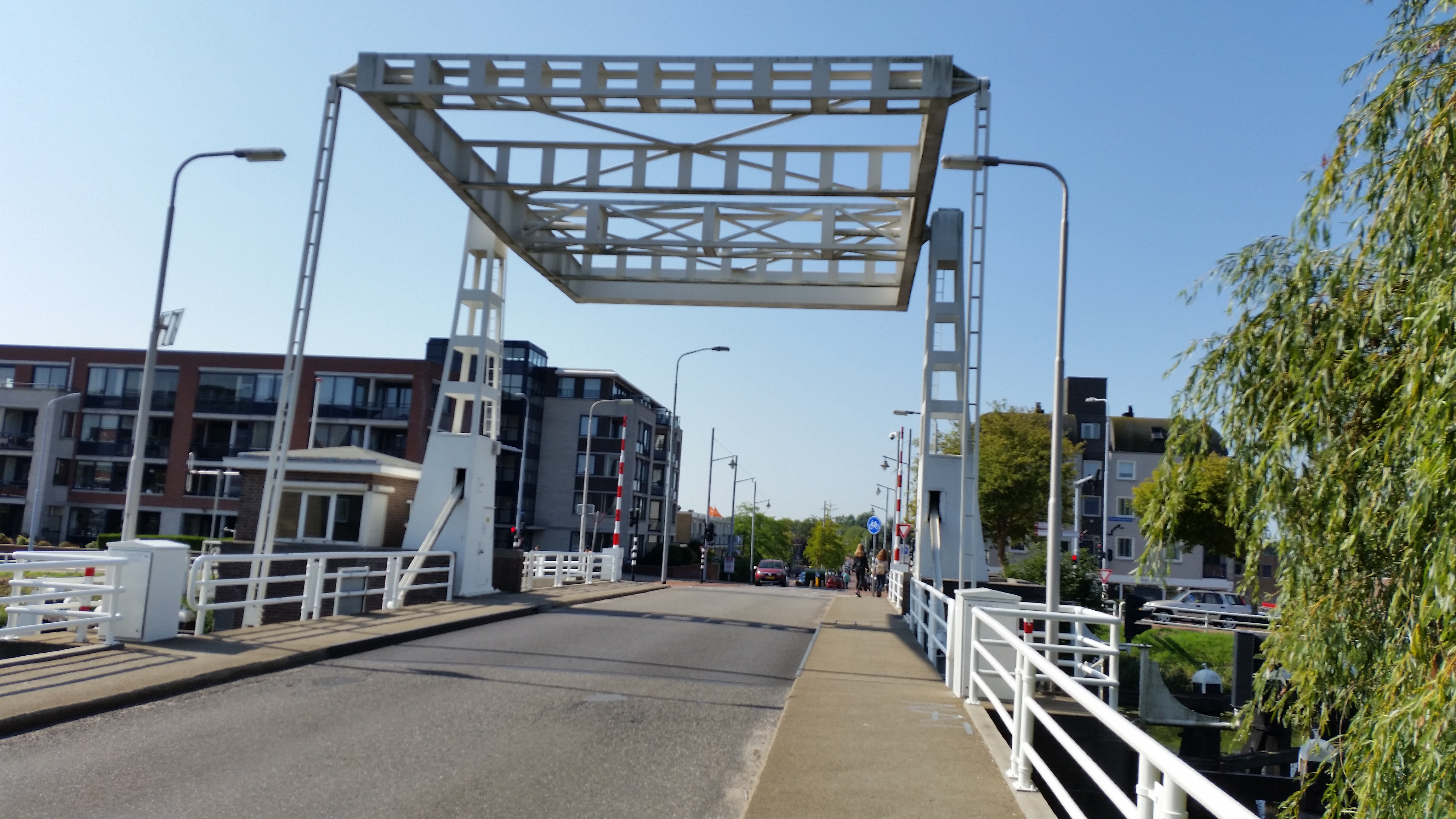 Zwanenburg-brug, overzicht vanuit Halfweg